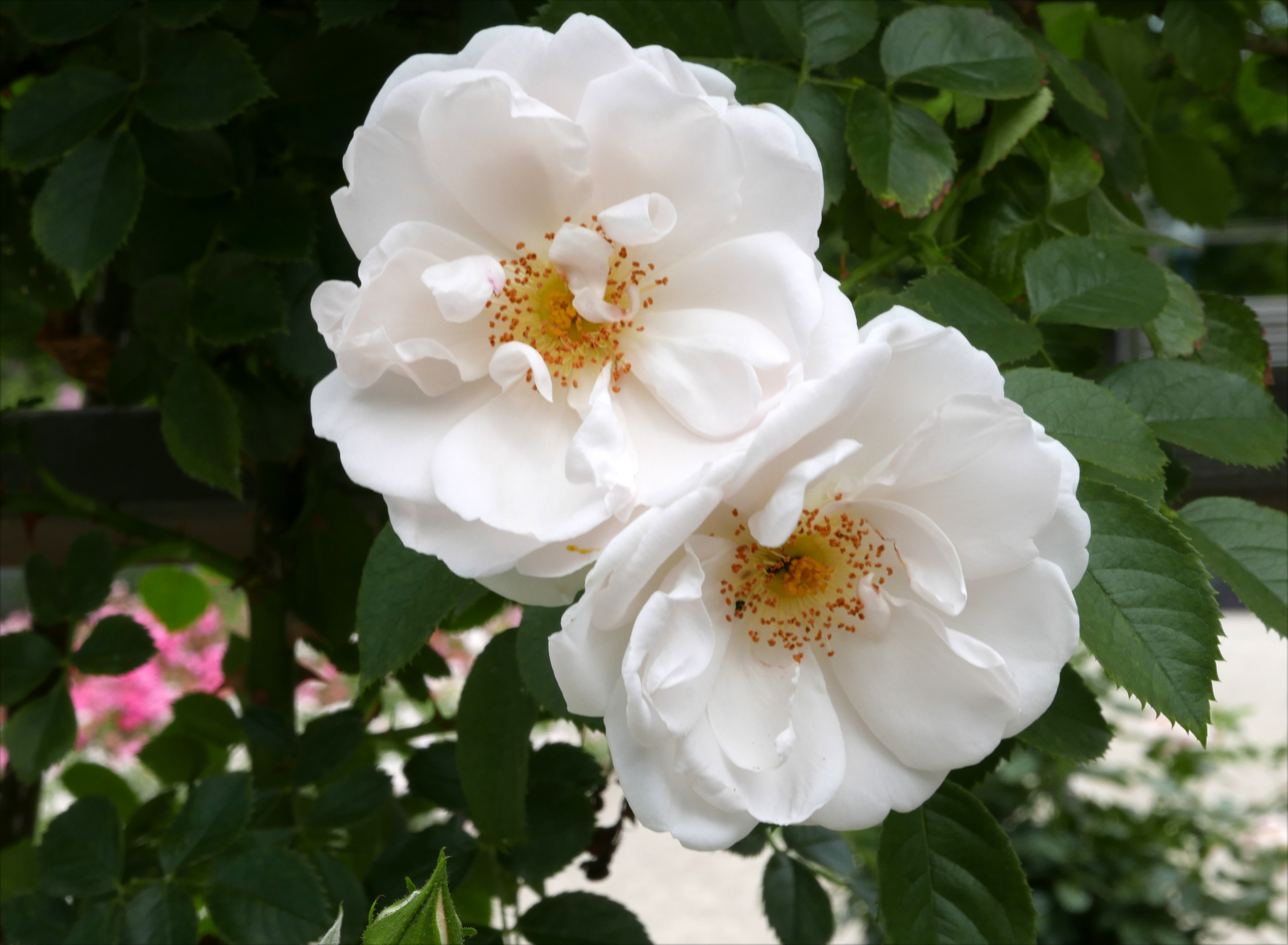 Rosarium Baden im Doblhoffpark (BD-122) : Rosa 'Hella' ; Kordes 2009